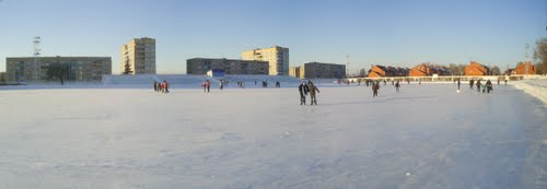 Каток на стадионе "Нефтяник", Ишимбай, 9.01.2011